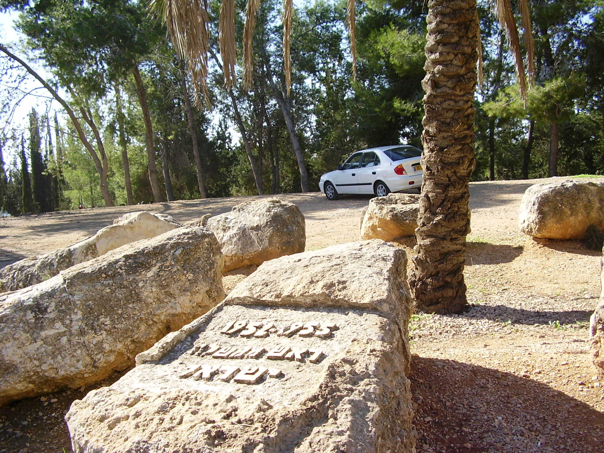 אתר זיכרון למשה שרת במצפה בקוע ביער המגינים